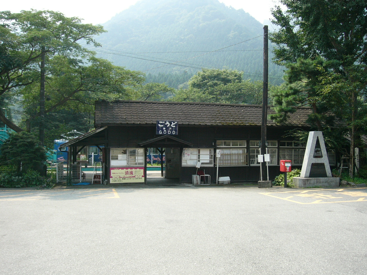 Godo Station